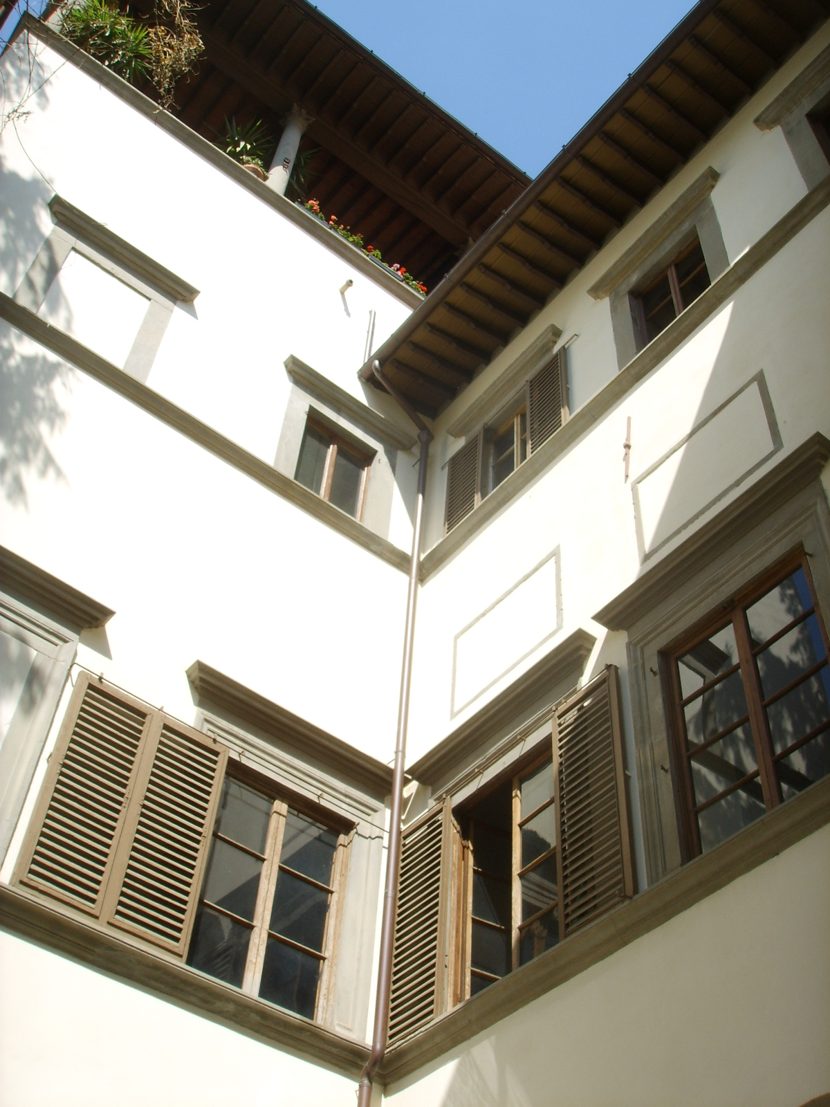 see description